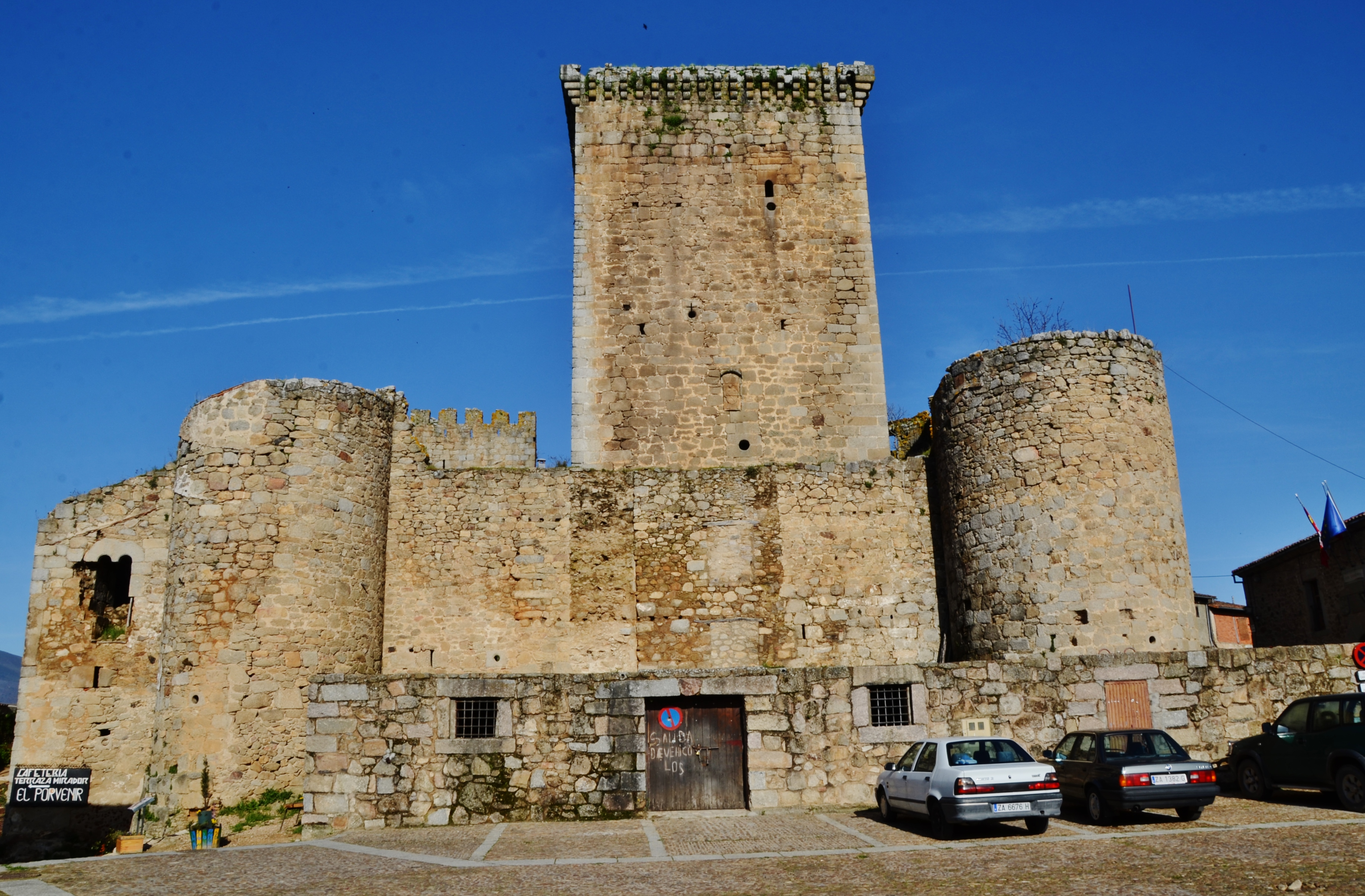 Castillo de Miranda del Castañar, Salamanca